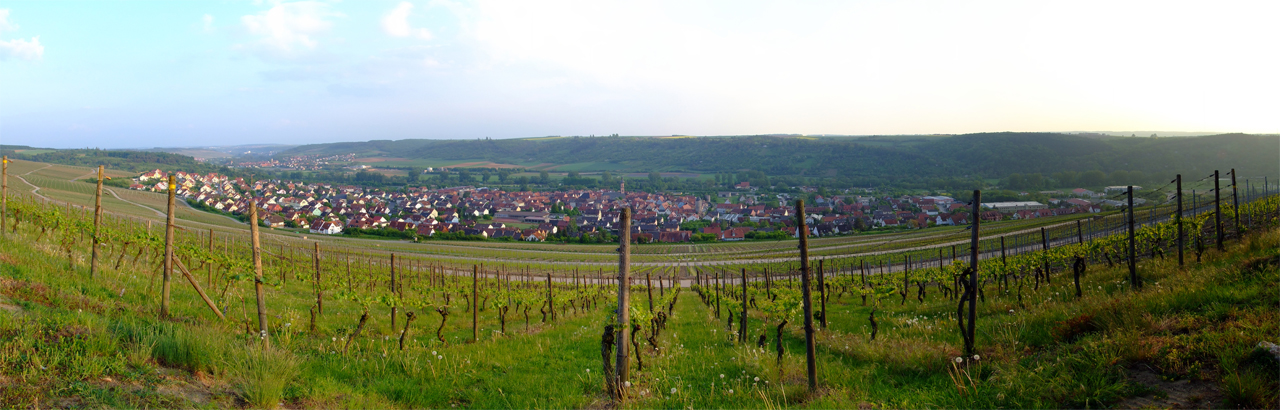 Eibelstadt von den Weinbergen aus fotografiert Uhrzeit: 19:56